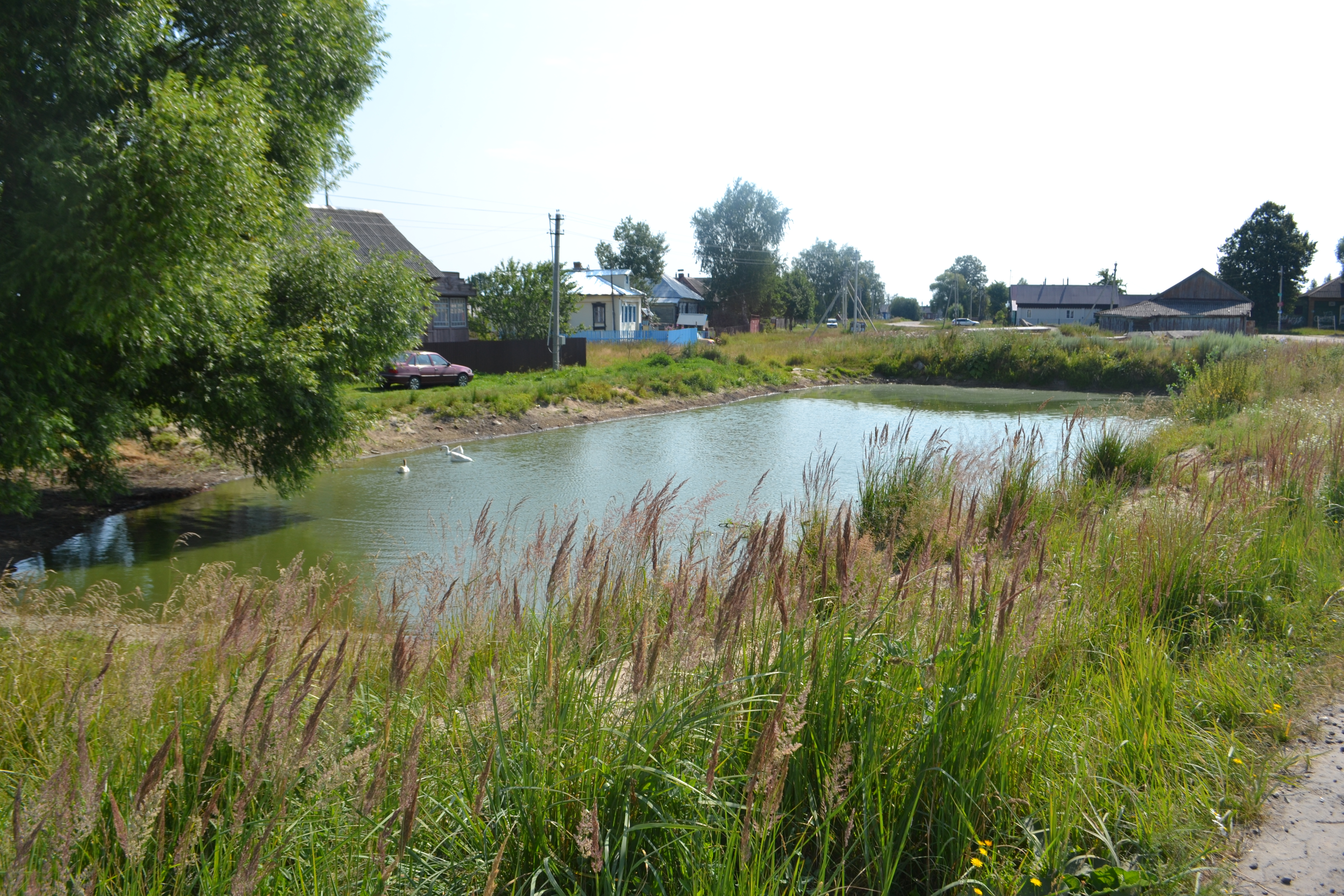 Пруд в Харлампеево (Шатурский район)